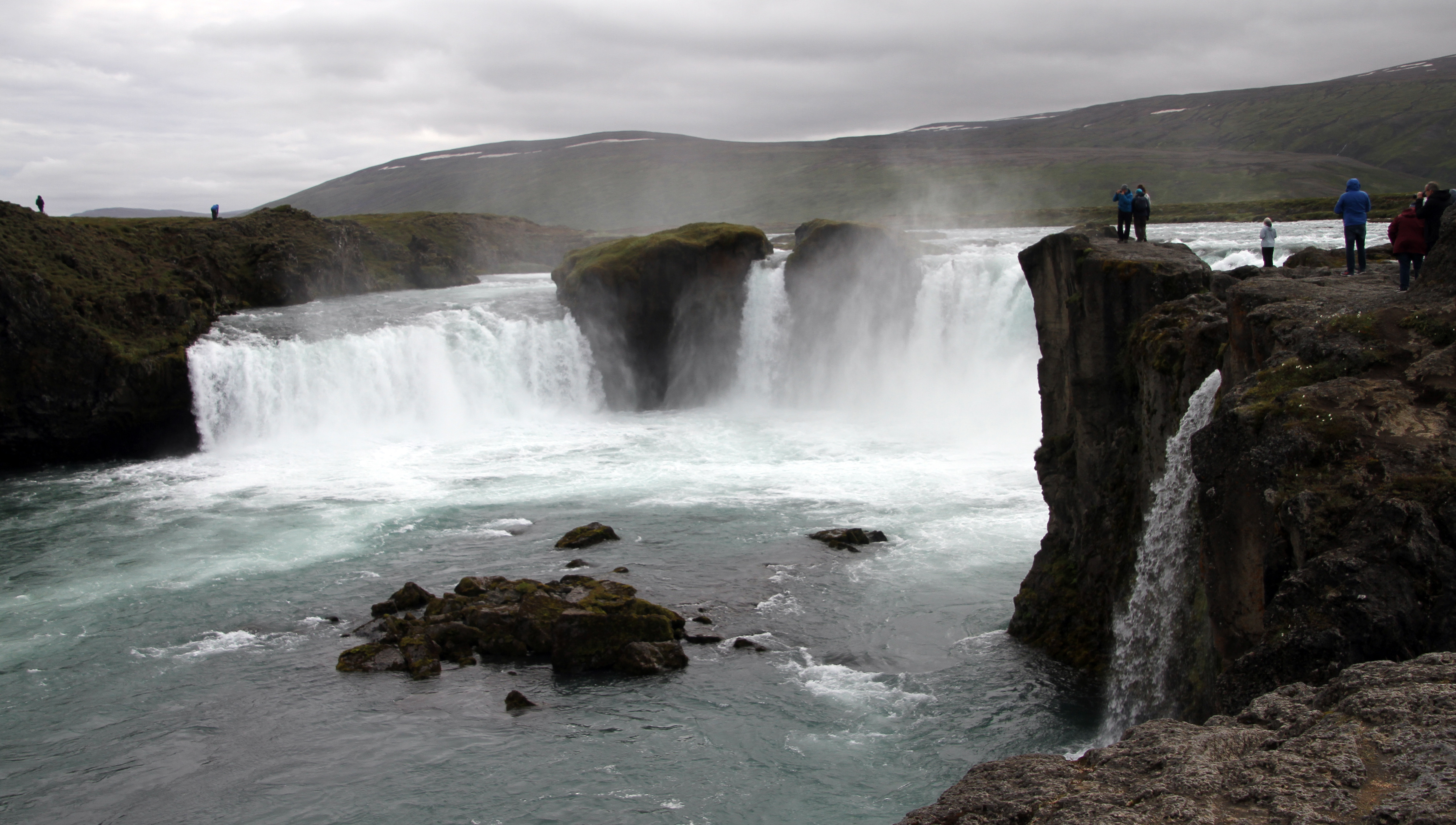 Goðafoss